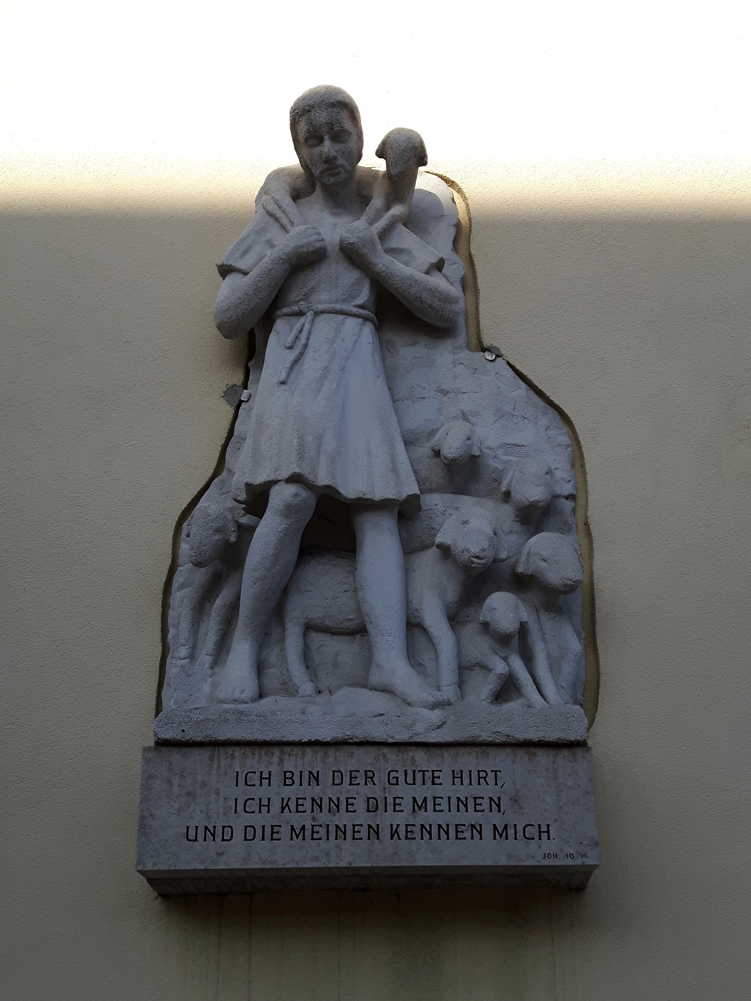 Relief an der Frontfassade der Pfarrkirche St. Martin in Wien-Siebenhirten.